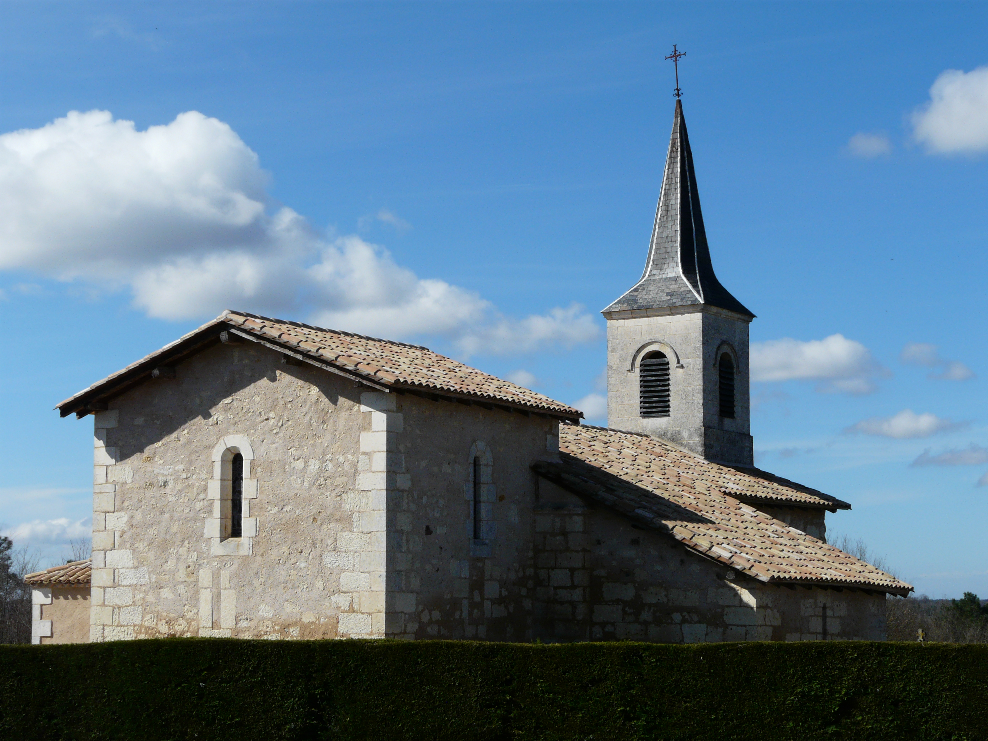 L'angle nord-est de l'église Saint-Étienne, Saint-Étienne-de-Puycorbier, Dordogne, France.